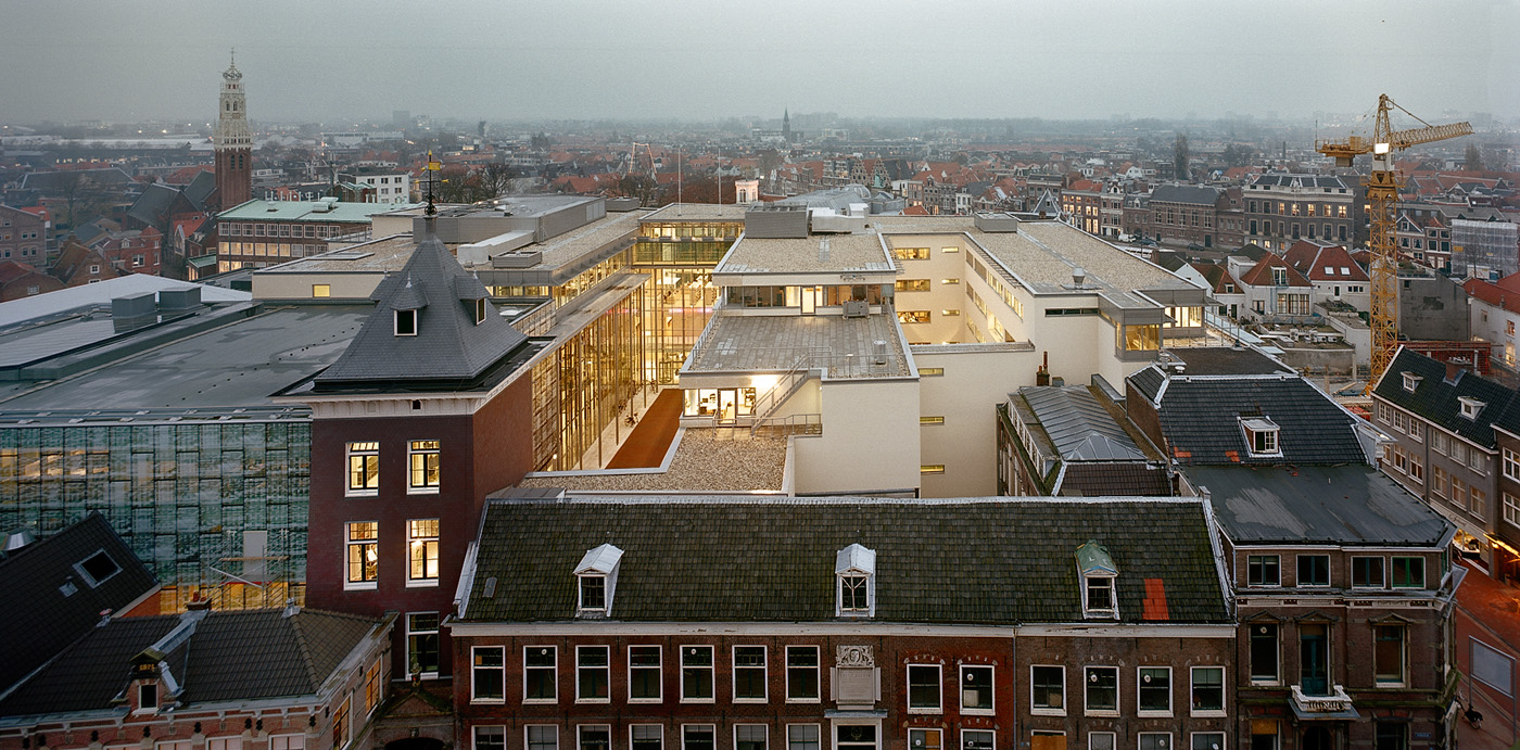 De binnenstad van Haarlem heeft nog de gave organische structuur die een Nederlandse stad van voor de Industriële Revolutie kenmerkt. Compacte pleinen en straten worden gevormd door aaneengesloten gevels waarin ook de openbare gebouwen zijn opgenomen. In deze context ligt, ingeperst tussen de middeleeuwse Bavokerk en het Teylers Museum, het voormalige Johan Enschedecomplex waarvan de opstallen gesloopt zijn. Om de diversiteit van stedelijke functies op deze centrale plek zo groot mogelijk te laten zijn heeft de gemeente gekozen om een hotel, een uitbreiding van het concertgebouw met 4.000 m2, een Gerechtsgebouw van 16.000 m2 en een parkeergarage voor 350 auto's bij elkaar te brengen. De voorgeschiedenis van deze ontwikkeling is problematisch verlopen. De burgerij van Haarlem was het niet eens met de voorgestelde plannen en de voorgestelde bebouwingshoogten. Om uit de impasse te komen werden nieuwe ontwerpers aangewezen die binnen een vastgestelde, strakke 'ruimte enveloppe' en 'demarcatielijnen' tot nieuwe oplossingen moesten komen. Bovendien eiste de gemeente een openbare wandelroute door het terrein van het Gerechtsgebouw. Wanneer de gevraagde volumina voor de verschillende functies worden gecombineerd met de geëiste ruimtelijke demarcaties, het beschermde stadsgezicht en de bijzondere eisen voor de beveiliging, logistiek en beleving van een Gerechtsgebouw kan met recht worden gesteld dat deze opgave het best te vergelijken is met een stedelijke Rubik's cube. Tussen de Klokhuistoren nabij de Bavo en het Teylers Museum is een nieuwe hof gemaakt en de openbare wandelroute waaraan de entree van het nieuwe Gerechtsgebouw is gelegd. Om deze hof heen zijn het rechtbankspecifieke deel, het publieksgedeelte en de kantoren gelegd. Hierdoor ontstaat een mooie en geleidelijke overgang van het lawaai en de drukte van de stad naar de rustige en ingetogen hof en vandaar naar de concentratie op de rechtspraak in de zittingszalen.